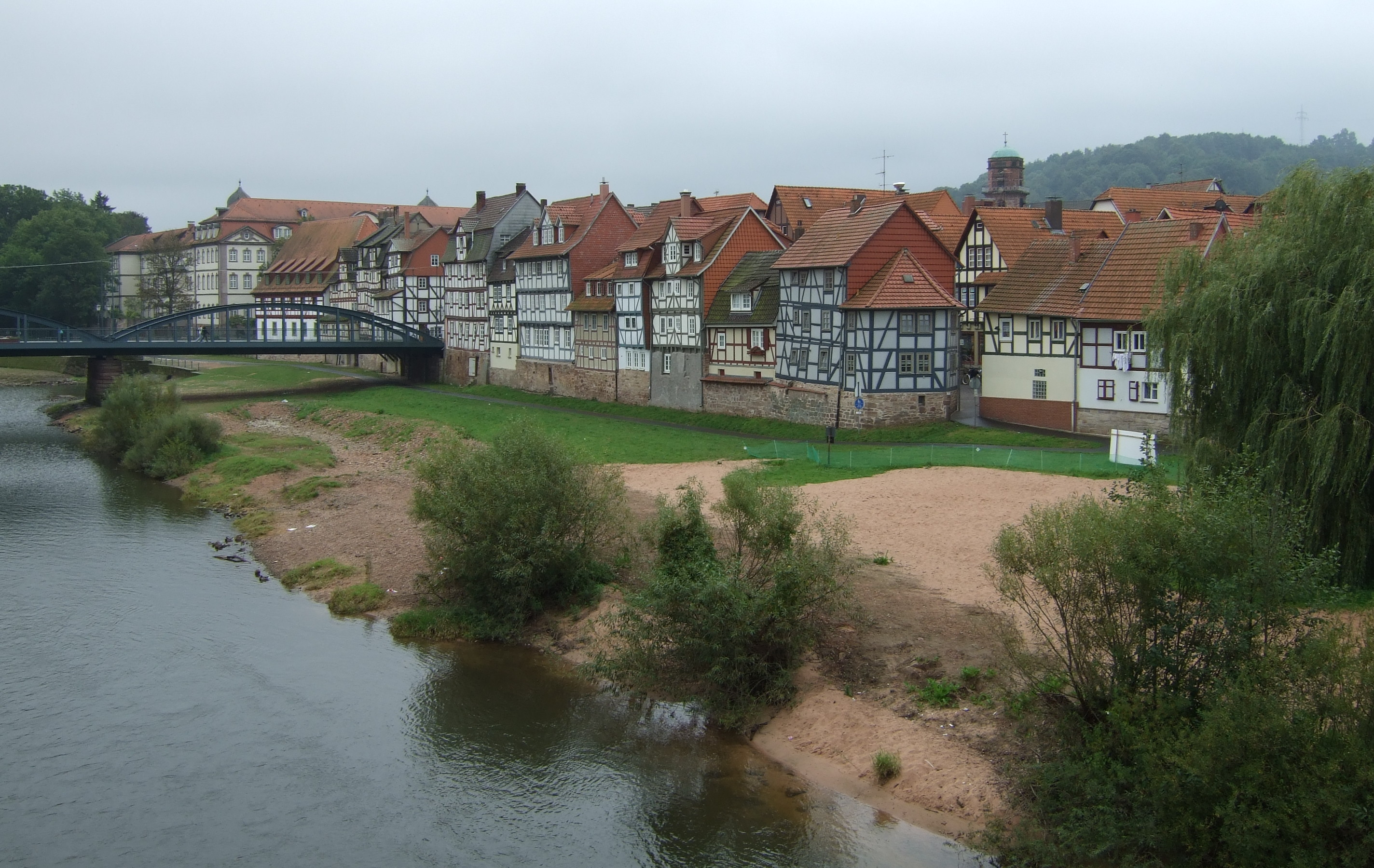 Historische Häuserzeile in Rotenburg (an der Fulda). Stehend aufgenommen von einer der Brücken aus mit Blick gegen Süd-Ost. Links im Hintergrund zu erahnen sind das Sperrwerk und die beiden Türme vom Schloss, weiter in der rechten Bildhälfte der Turm der evangelischen Stadtkirche.